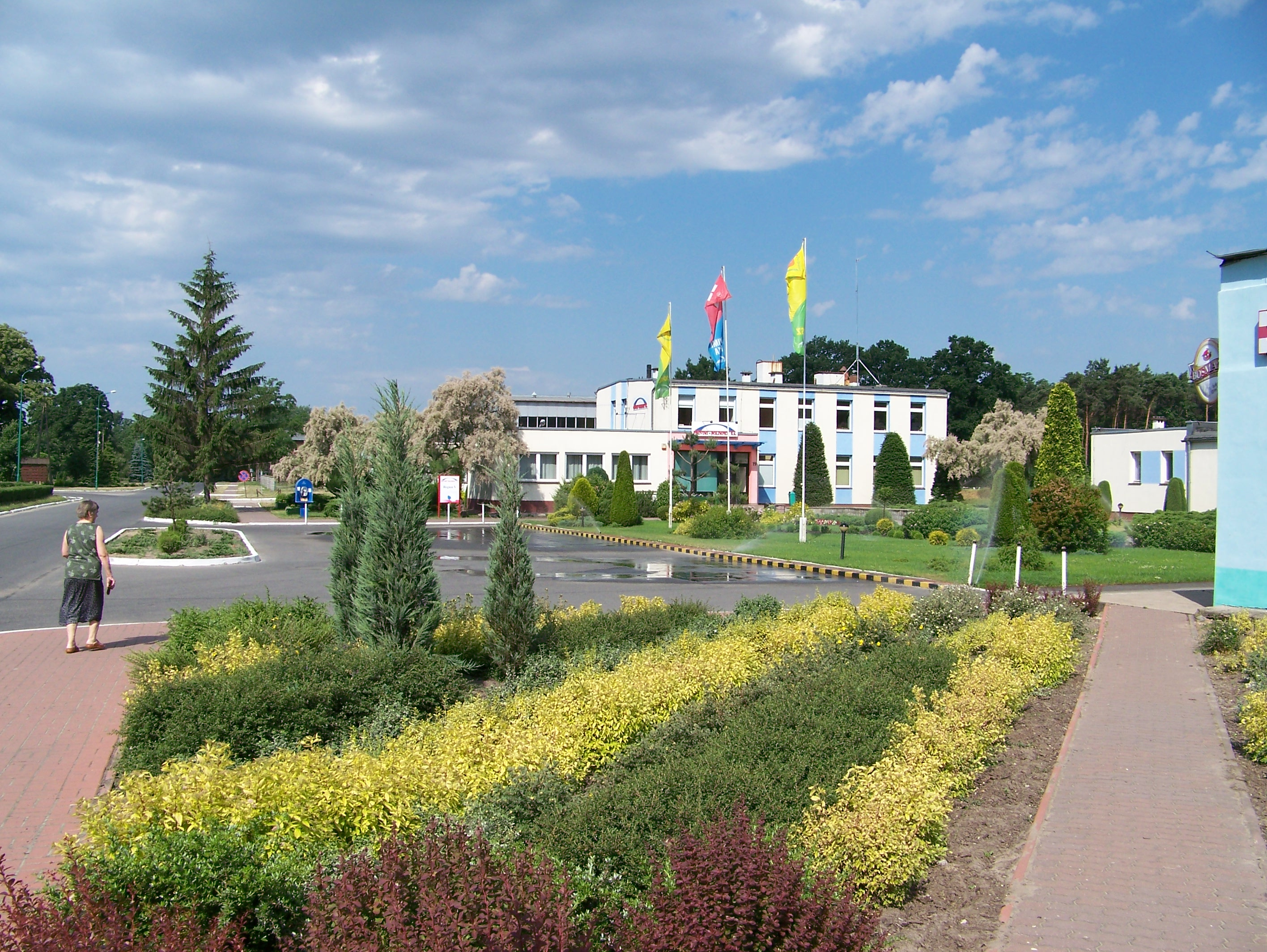 Bieganów (województwo lubuskie)